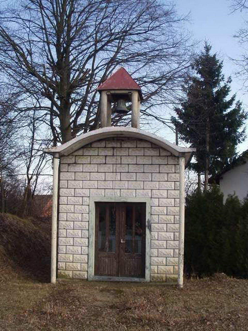 Hruškovica - Chapel Front View